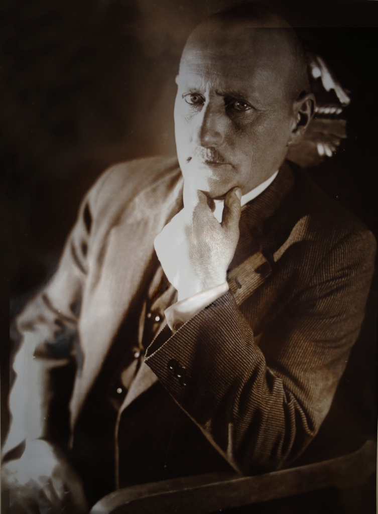 Ing. Arthur Posnansky en su estudio de la ciudad de La Paz, Bolivia